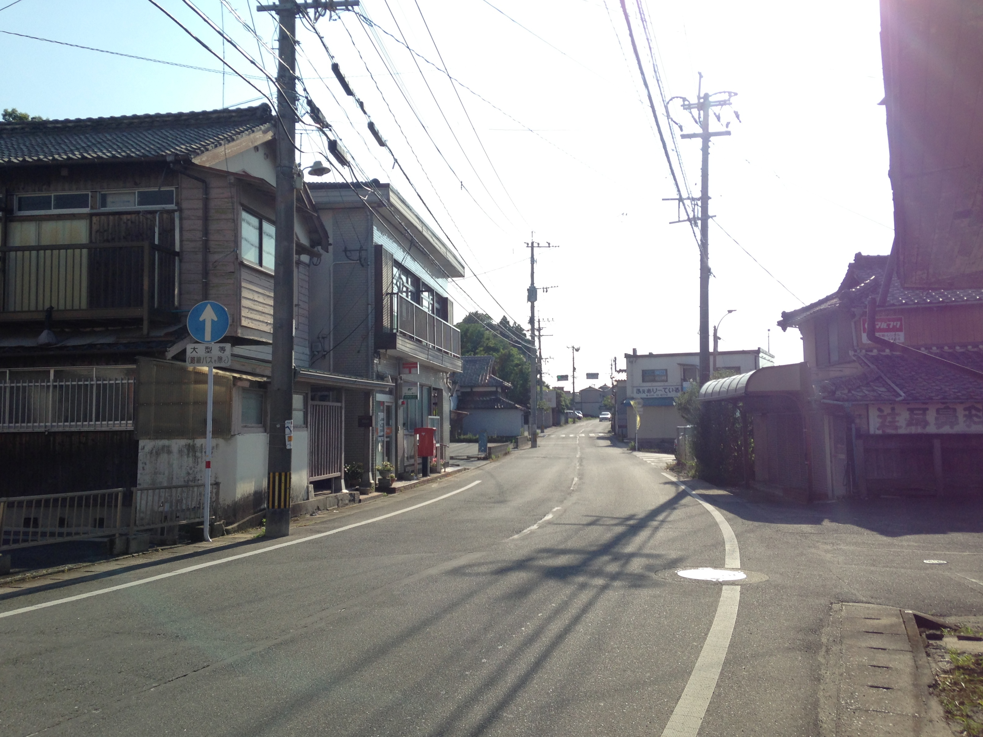 倉掛バス停付近の熊本県道29号・福岡県道787号共線区間